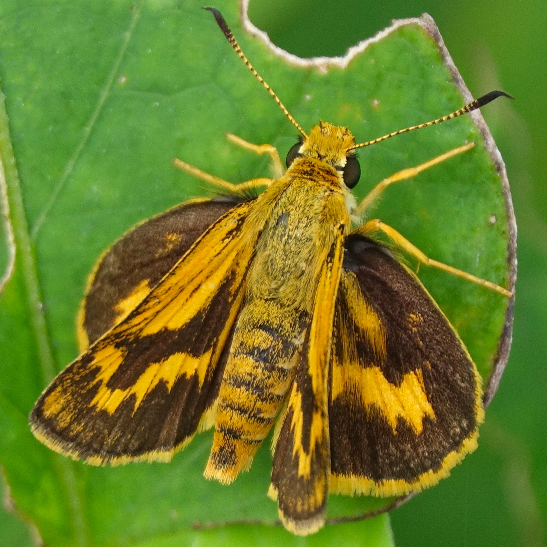 葉に止まるキマダラセセリ 日本、東海地方の公園にて